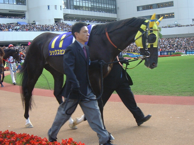 シックスセンス